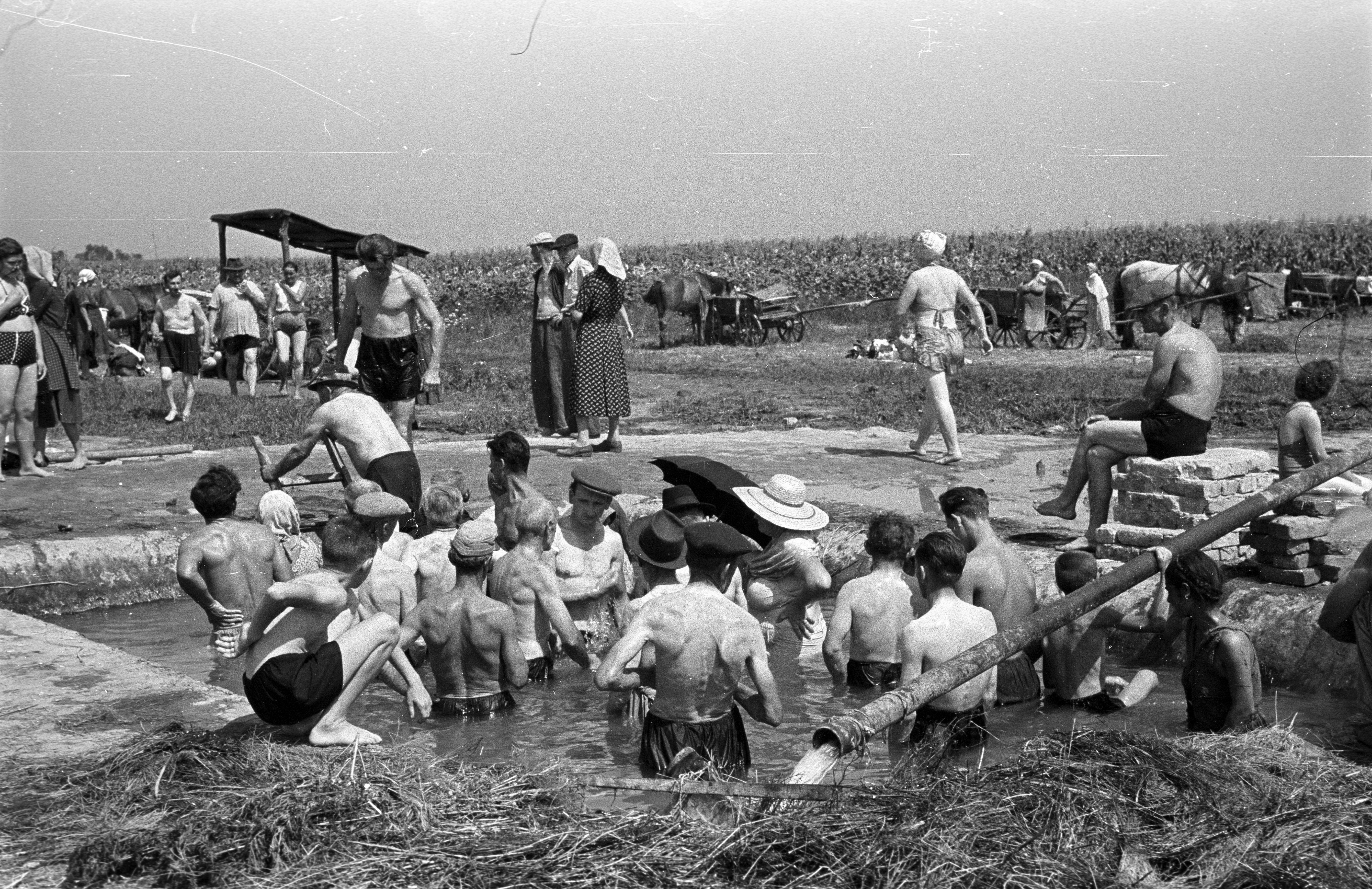 Csisztapuszta. Location: Hungary, Buzsák Tags: bathing, sunshades, Horse-drawn carriage Title: Csisztapuszta.